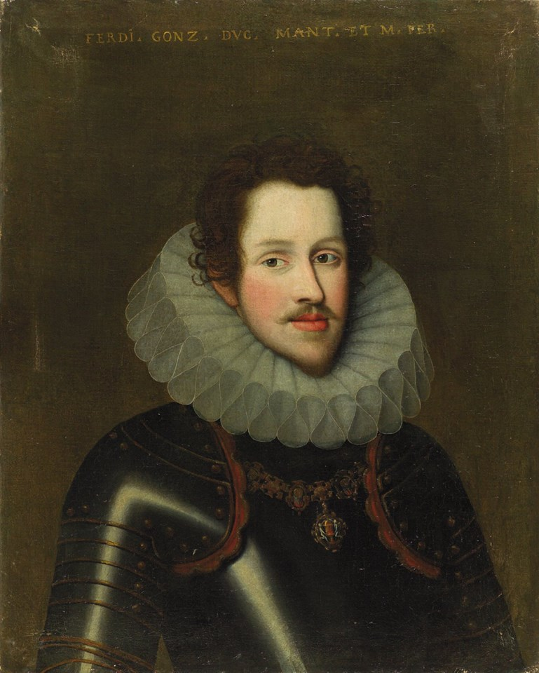 ritratto del Duca Ferdinando Gonzaga